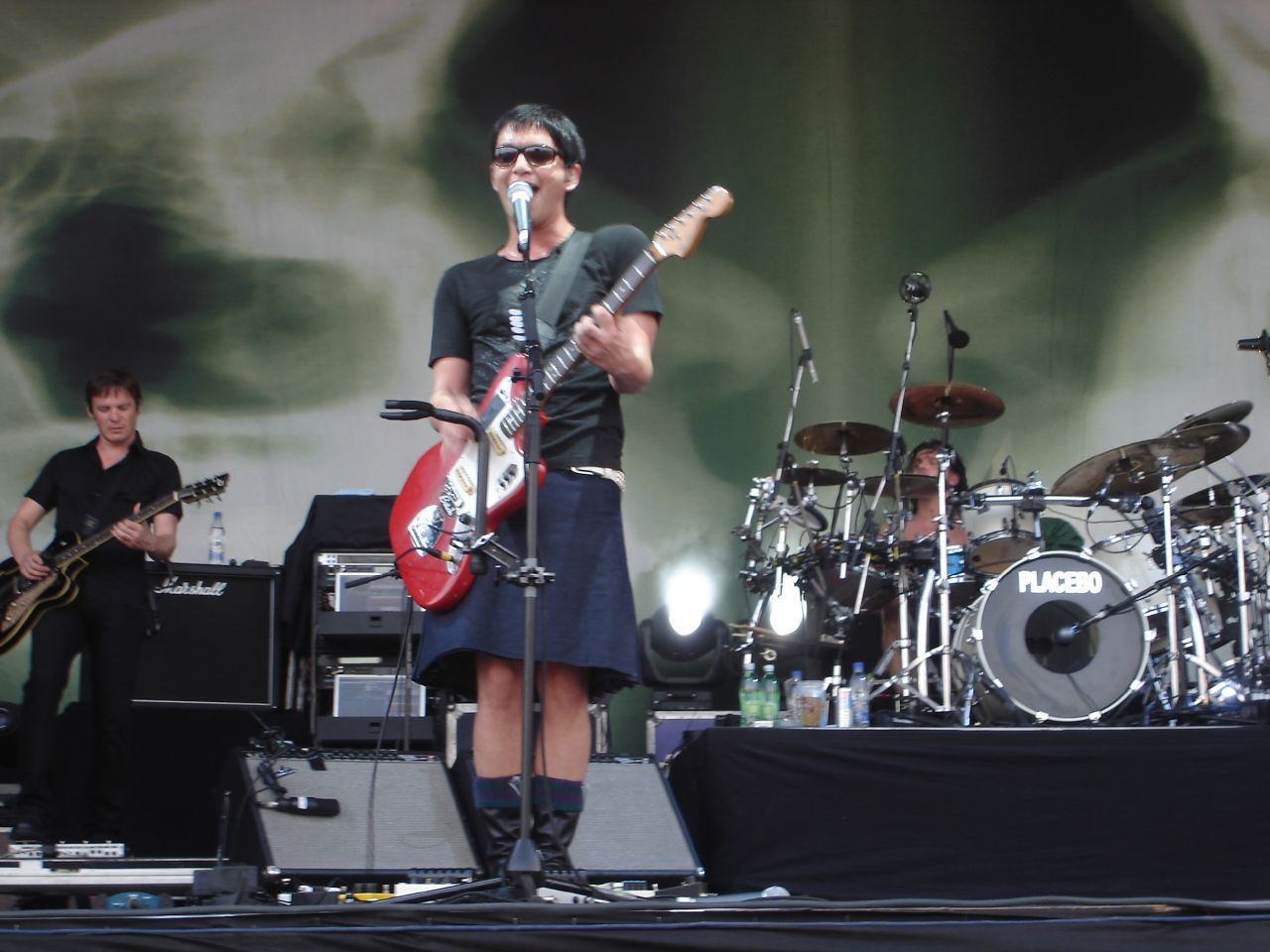 Placebo @ Radar Festival Zagreb 2007